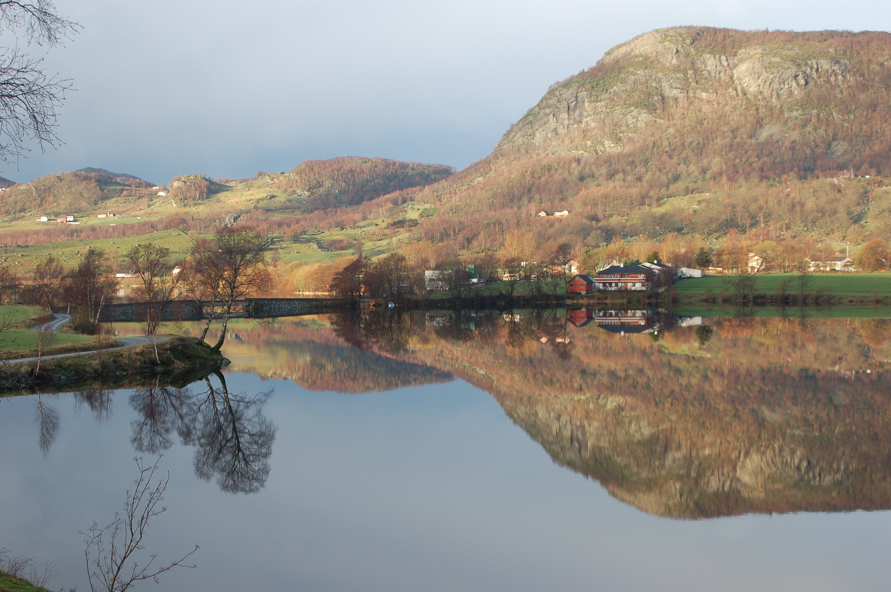 Bjørheimsvatnet, Strand, Rogaland, Norway